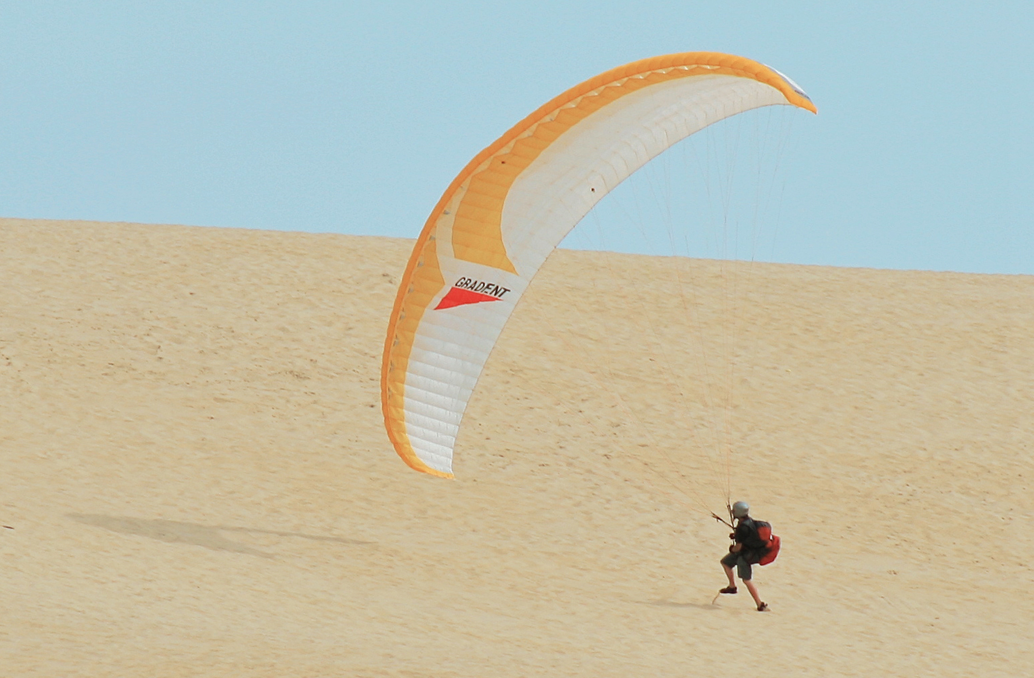 Un parapentiste gonfle sa voile sur la dune du Pilat.